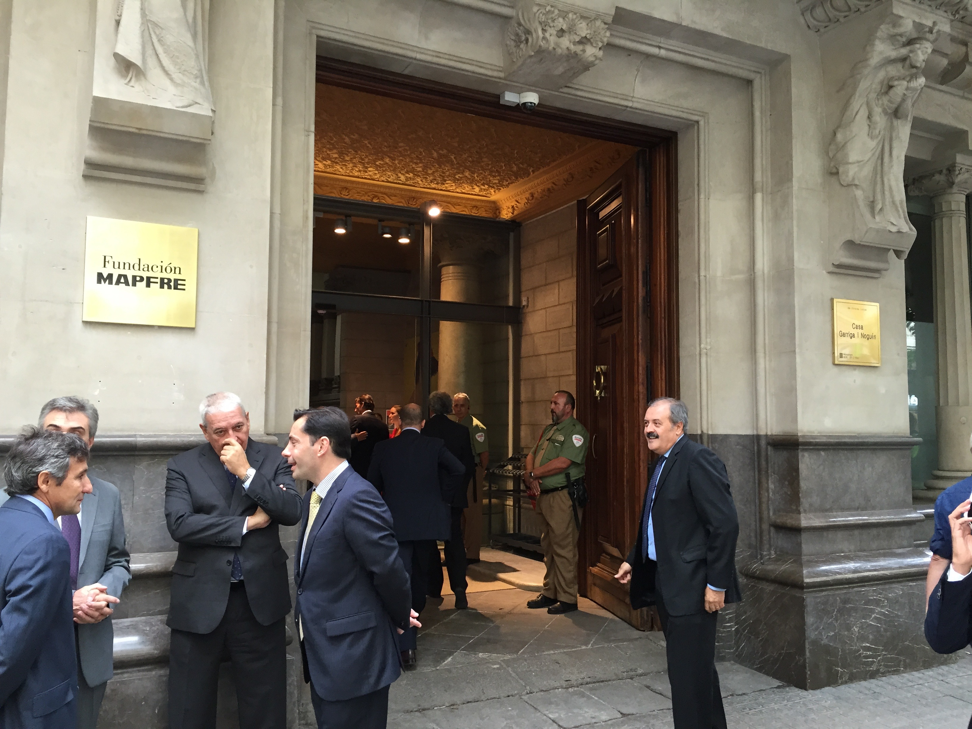 Fundació Mapfre inauguració Casa Garriga Nogués 2015